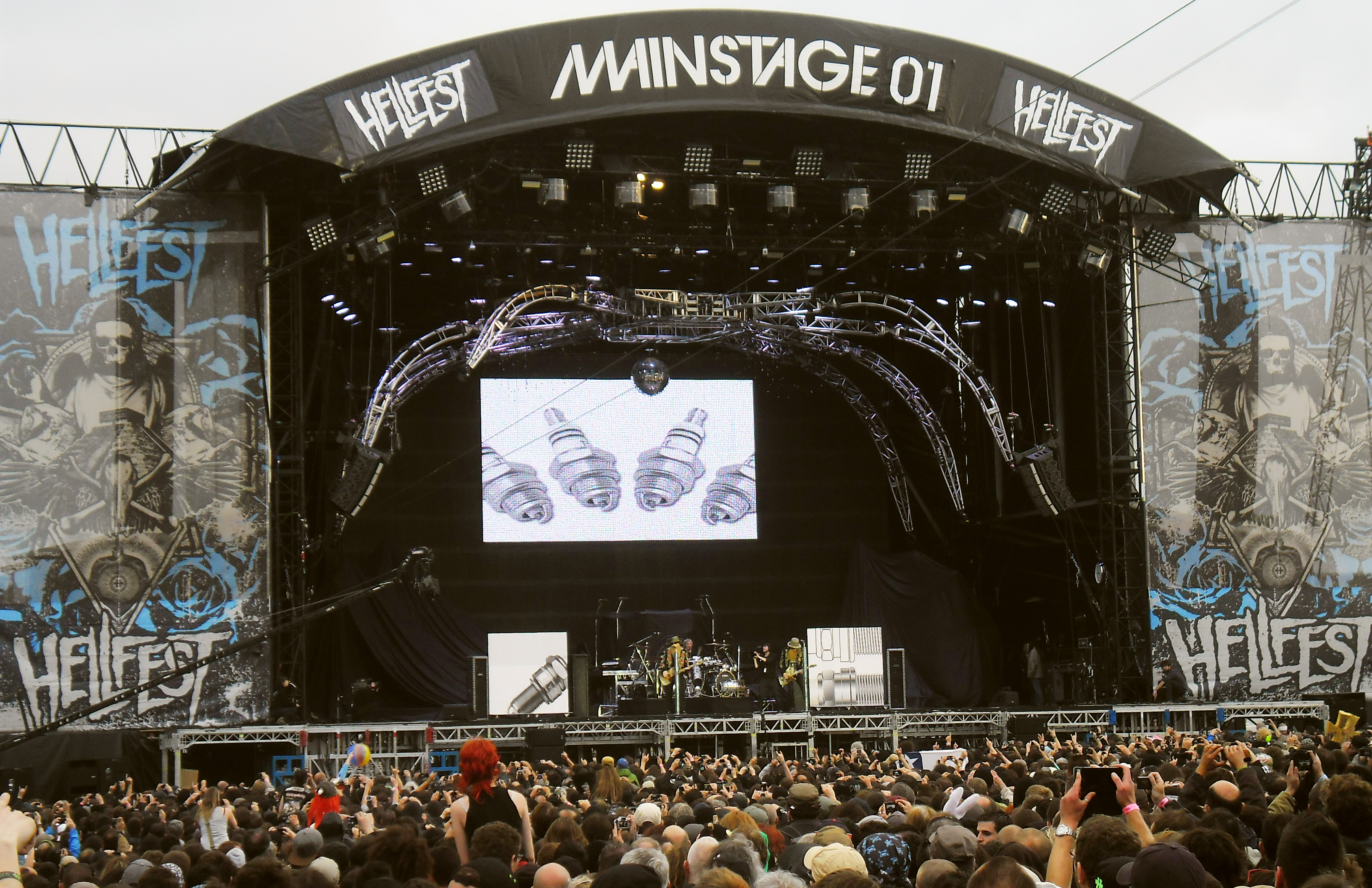 ZZ Top au Hellfest 2013